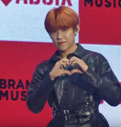 22일 서울시 송파구 방이동 올림픽공원 올림픽홀에서 보이그룹 AB6IX(임영민X김동현X이대휘X박우진X전웅)의 데뷔앨범 ‘B:COMPLETE’ 발매 기념 쇼케이스가 열려 개별 포토타임을 갖고 있다.